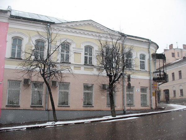 Віцебск. Суворава